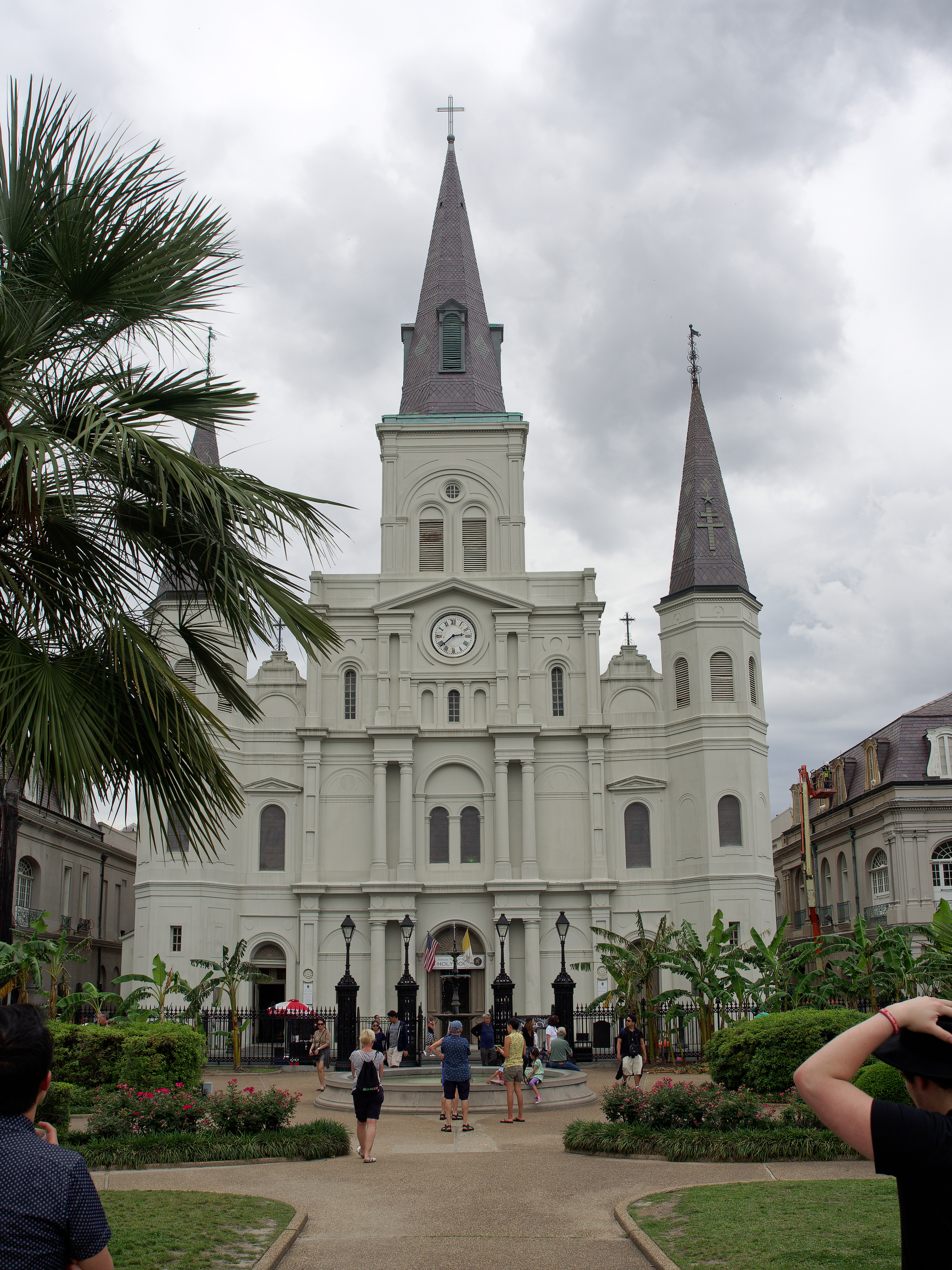 Fassade und Türme der Kirche Cathedral-Basilica of Saint Louis King of France (Basilica minor) in New Orleans, Luisiana, USA.